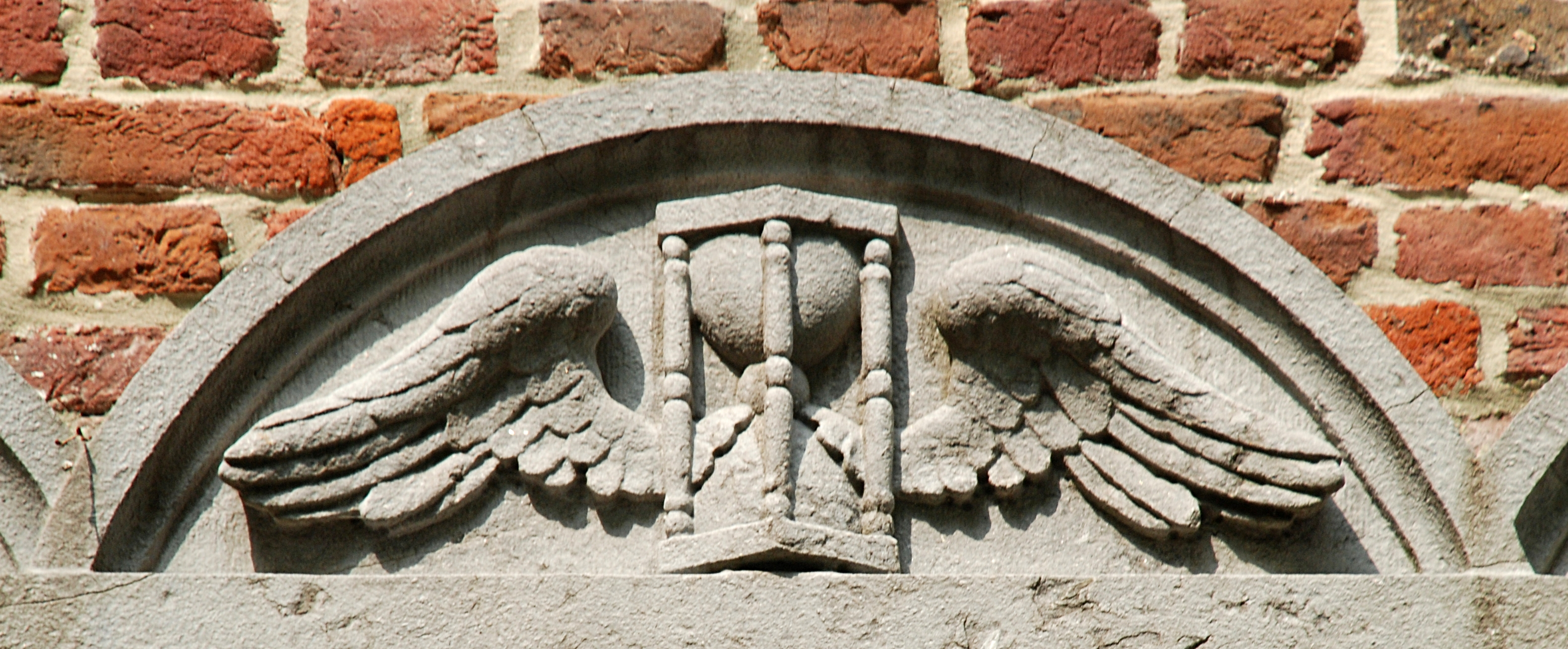 Belgique - Brabant wallon - Ottignies - Église Saint-Rémi